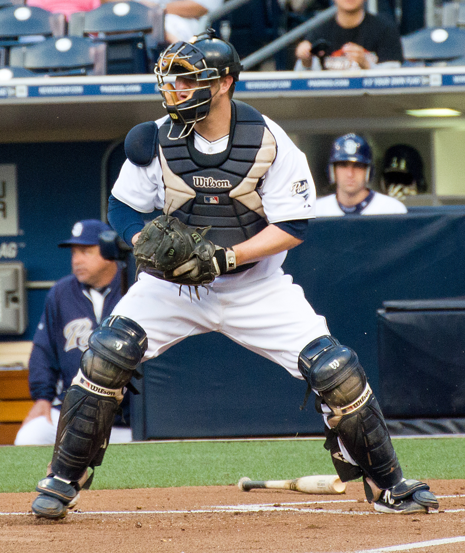 Kyle Phillips